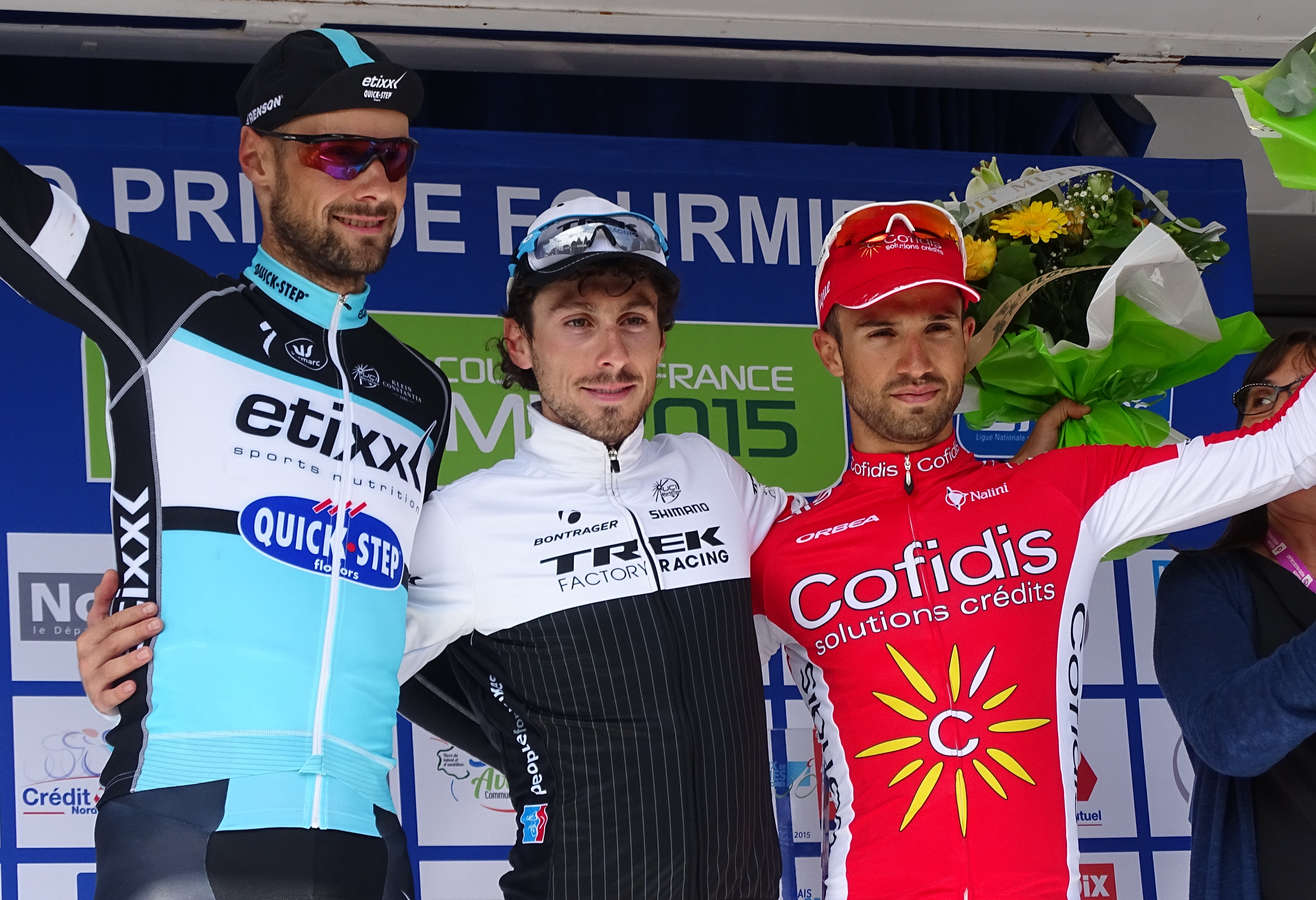 Reportage réalisé le dimanche 6 septembre à l'occasion du départ et de l'arrivée du Grand Prix de Fourmies 2015 à Fourmies, Nord-Pas-de-Calais, France.